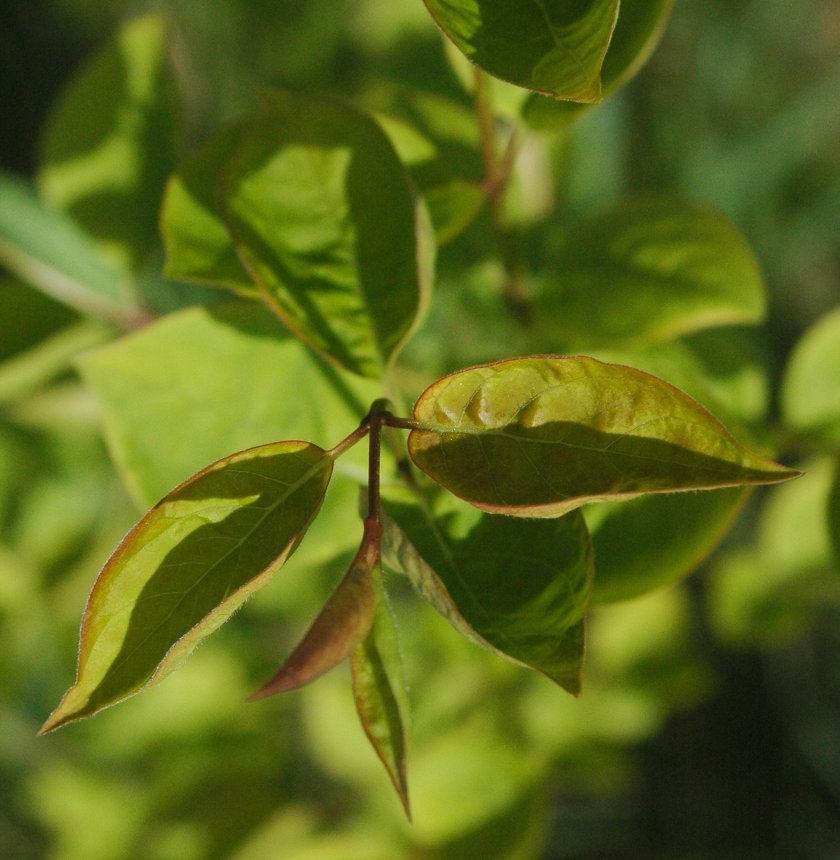 Syringa reticulata subsp. amurensis